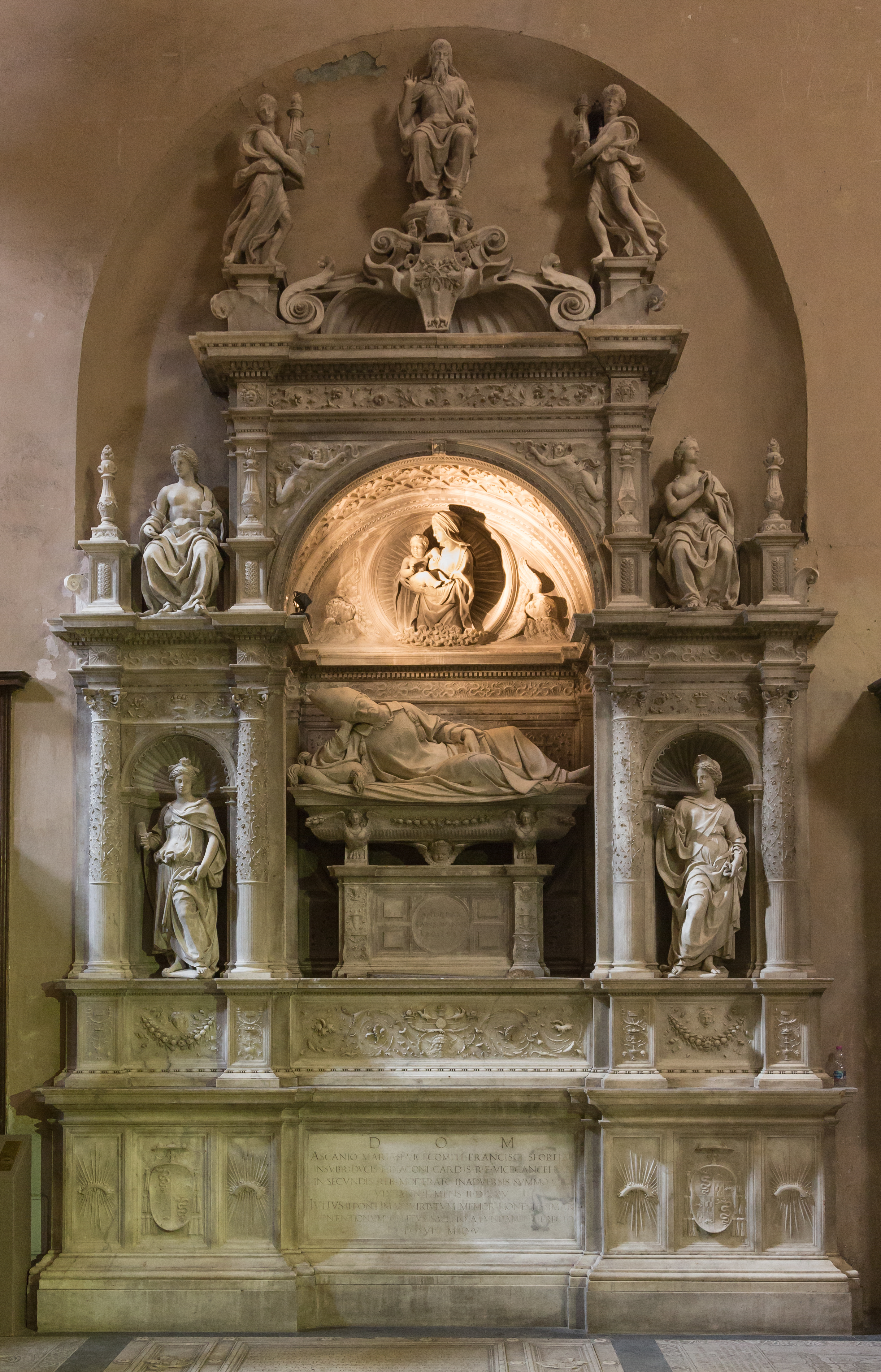 Rom - Basilika Santa Maria del Popolo